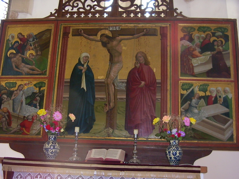 Prázsmári evangélikus erődtemplom, Szent Kereszt-szárnyasoltár